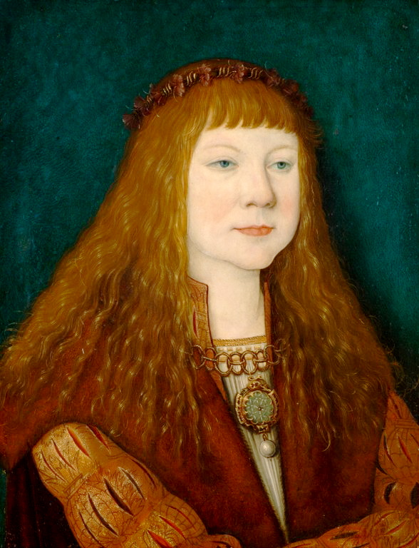 König Ludwig II. von Ungarn als KnabeLouis II of Hungary as a Childlabel QS:Lde,"König Ludwig II. von Ungarn als Knabe"label QS:Len,"Louis II of Hungary as a Child"